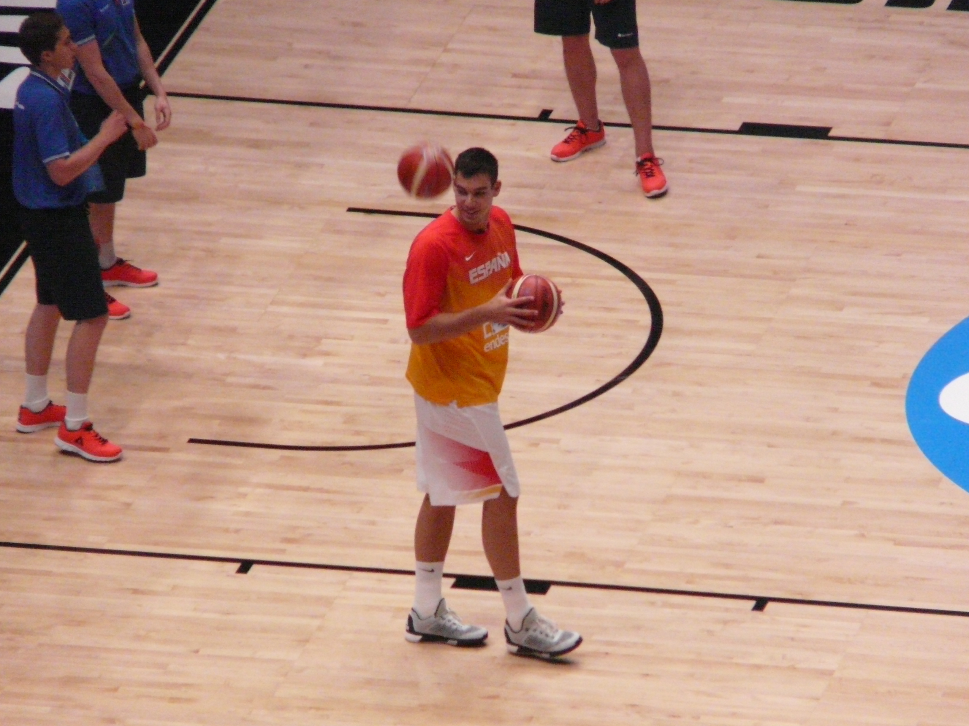 Willy Hernangómez (#7) à l'échauffement lors du quart de finale de l'EuroBasket 2015 entre l'Espagne et la Grèce, le 15 septembre 2015.